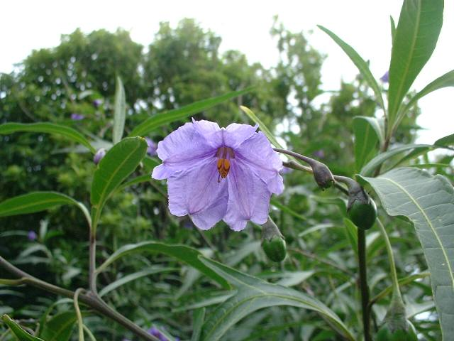 Solanum aviculare (fleur)